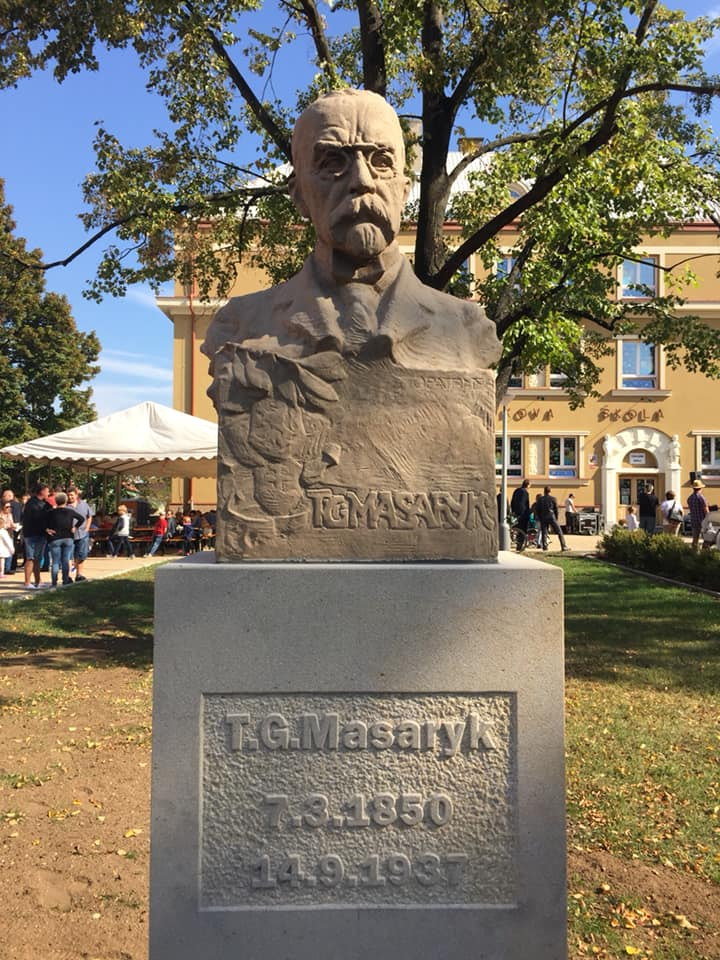 Busta Tomáše Gariggue Masaryka odhalena dne 28.9.2018 před stejnojmennou základní školou v Podbořanech.